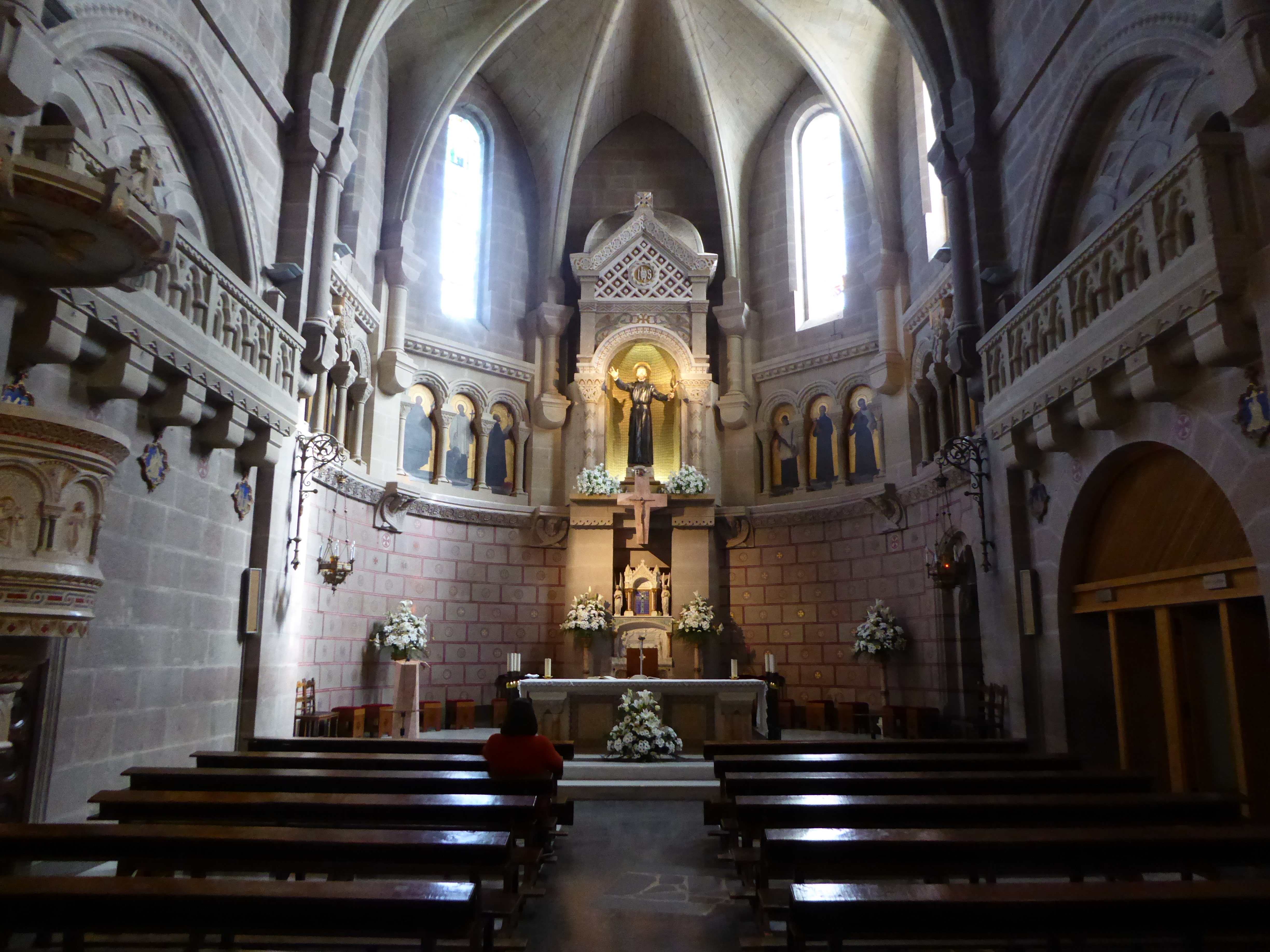 Basilica de San Francisco Javier